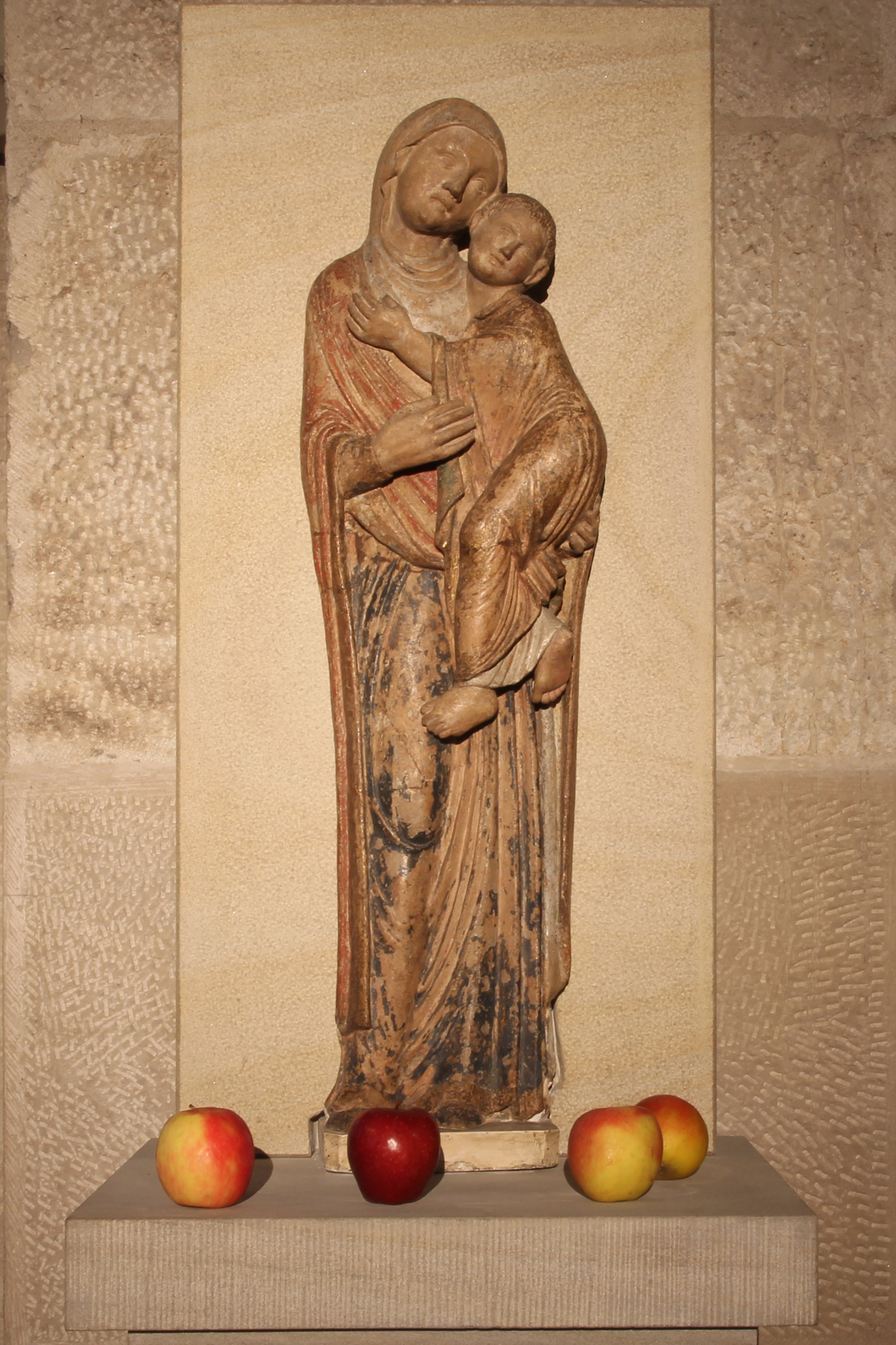 Marienstatue mit Äpfeln in St. Maria im Kapitol, Köln